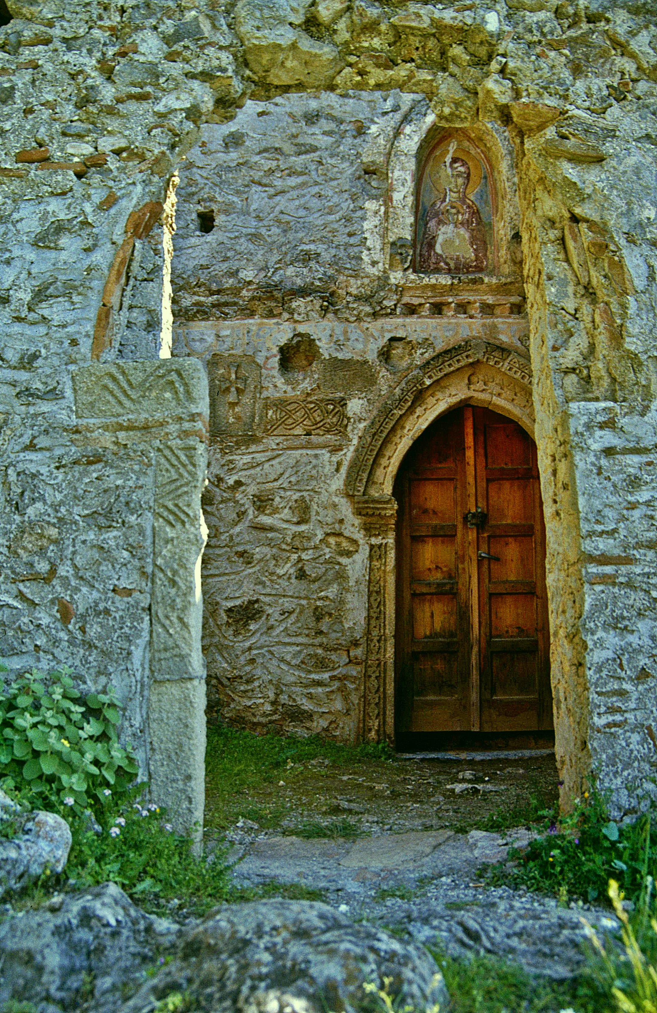 byzantinische Ruinenstadt Geraki (Detail)